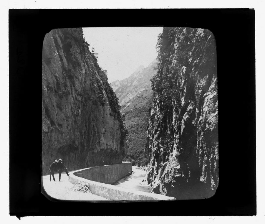 Chaîne des Pyrénées, gorges de Saint-Georges à Axat (Aude). Fin 19e siècle. Vue d'ensemble des gorges. A gauche et à droite parois rocheuses ; à gauche route sur laquelle se tiennent deux hommes en costumes et chapeaux ; au centre la rivière de l'Aude ; en arrière plan flanc d'un sommet des Pyrénées. Etiquette imprimée : « E. Trutat N° ».